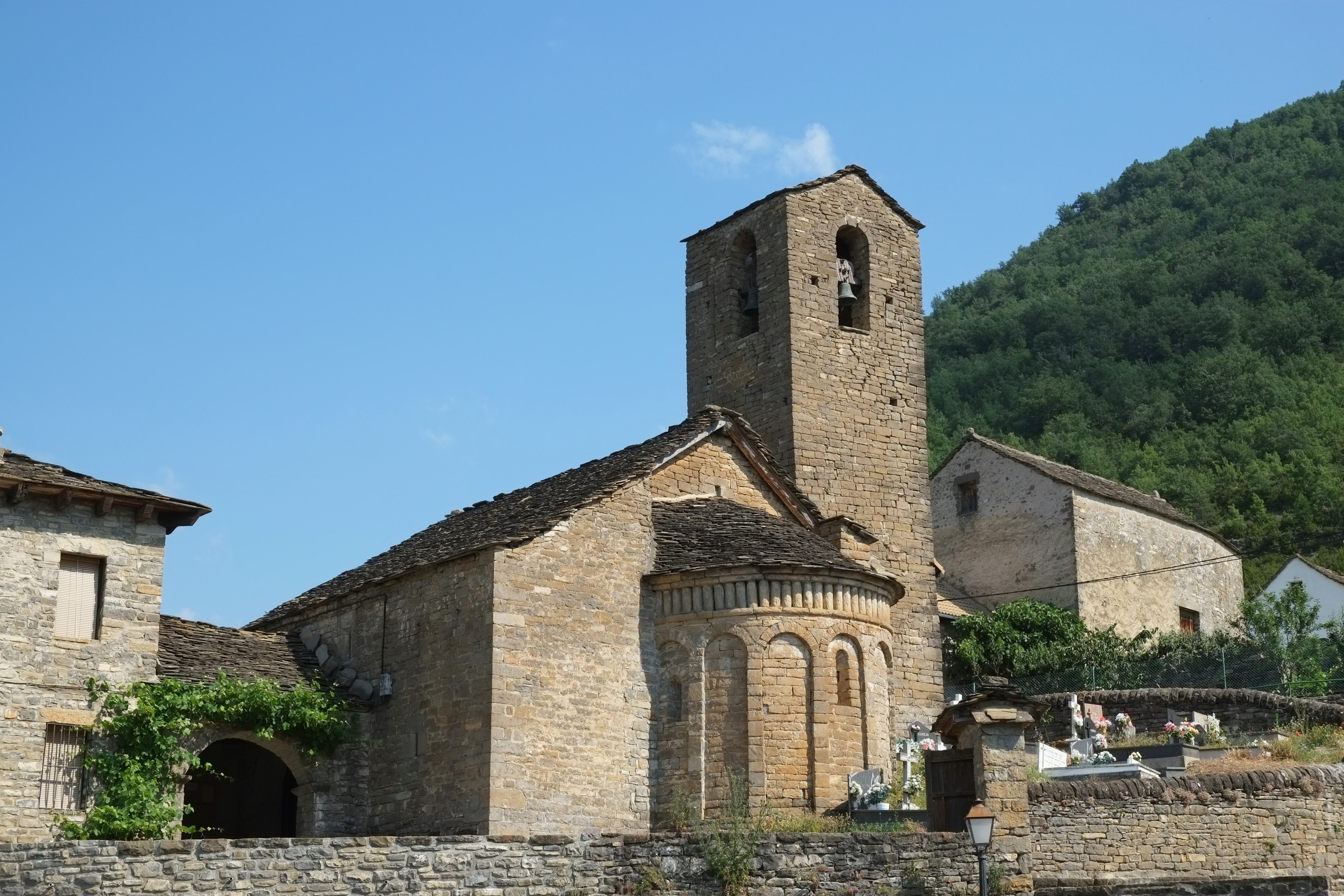 Kirche San Martín in Oliván in der Provinz Huesca in Aragonien (Spanien)